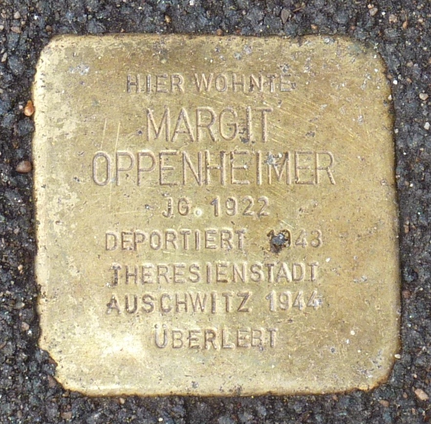 Stolperstein für Margit Oppenheimer